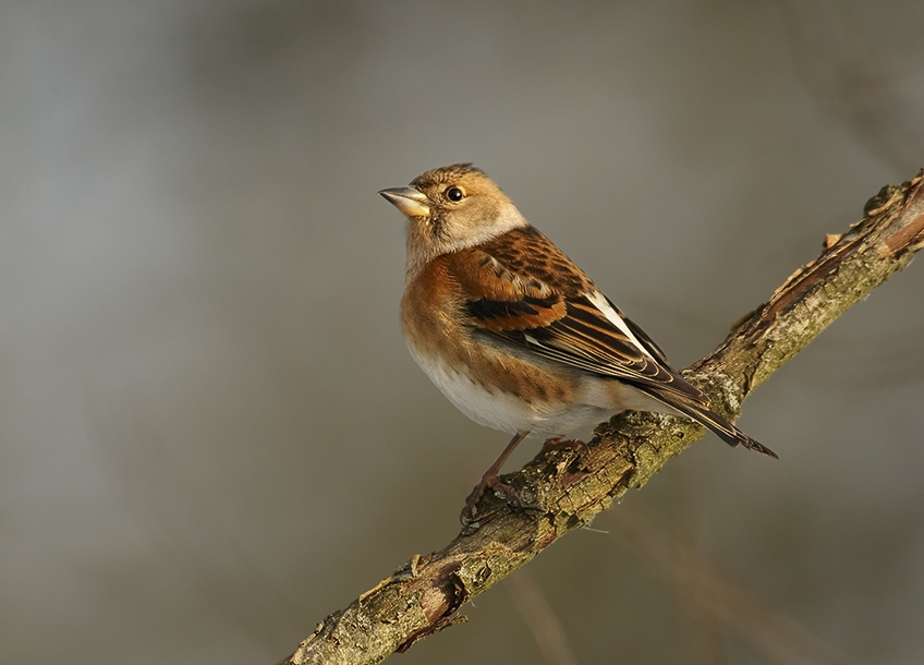 Fringilla montifringilla - female